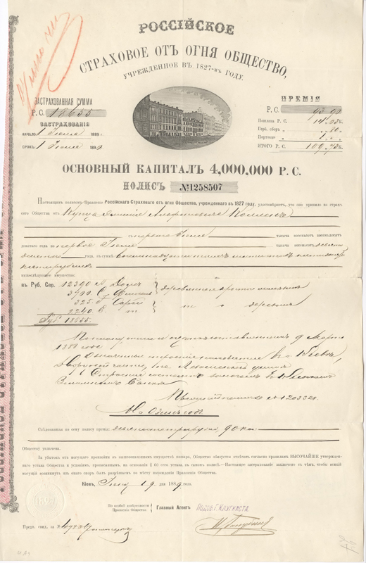 Страховой полис Российского от огня страхового общества. Начало ХХ века